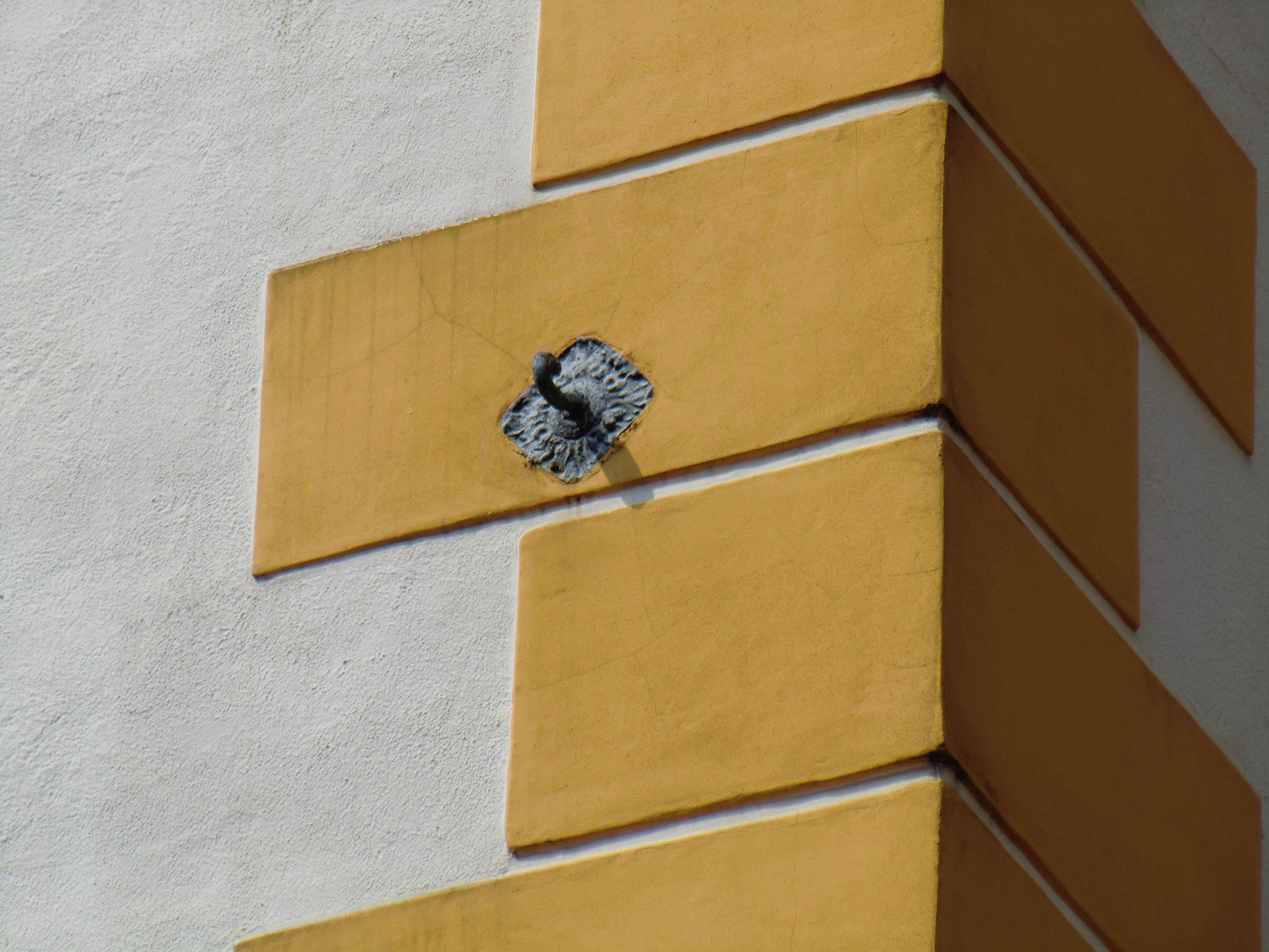 Wandrosette mit Fahrdrahtaufhänger der ehemaligen Straßenbahn Freiberg an der Ecke Burgstraße/Obermarkt